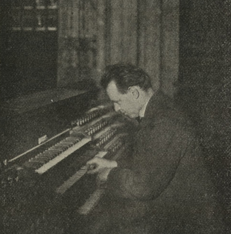 Karl Josef Walter (1892–1983), deutscher Komponist, Organist und Musikpädagoge.